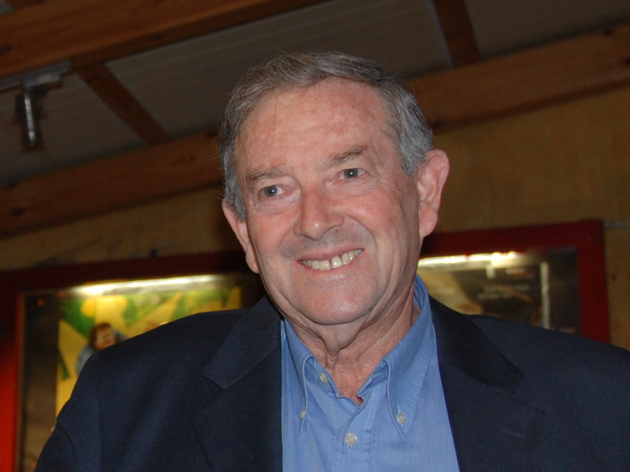 Daṿid Ḳroyanḳer